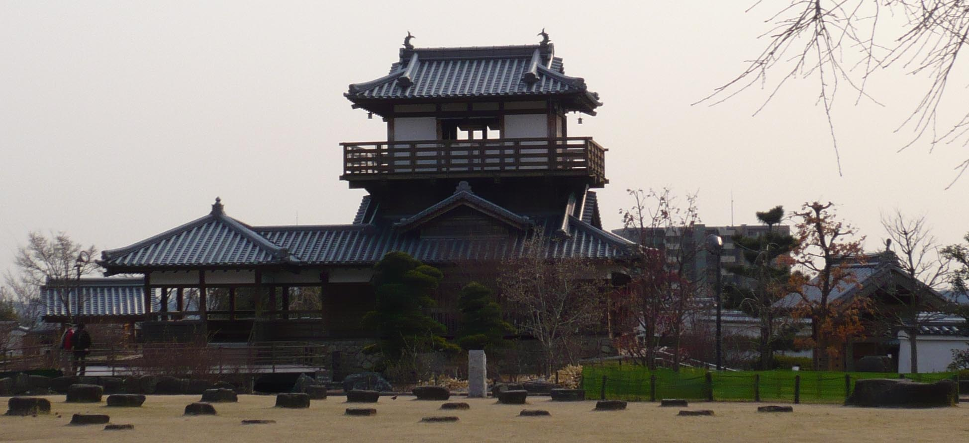 池田城の模擬櫓台